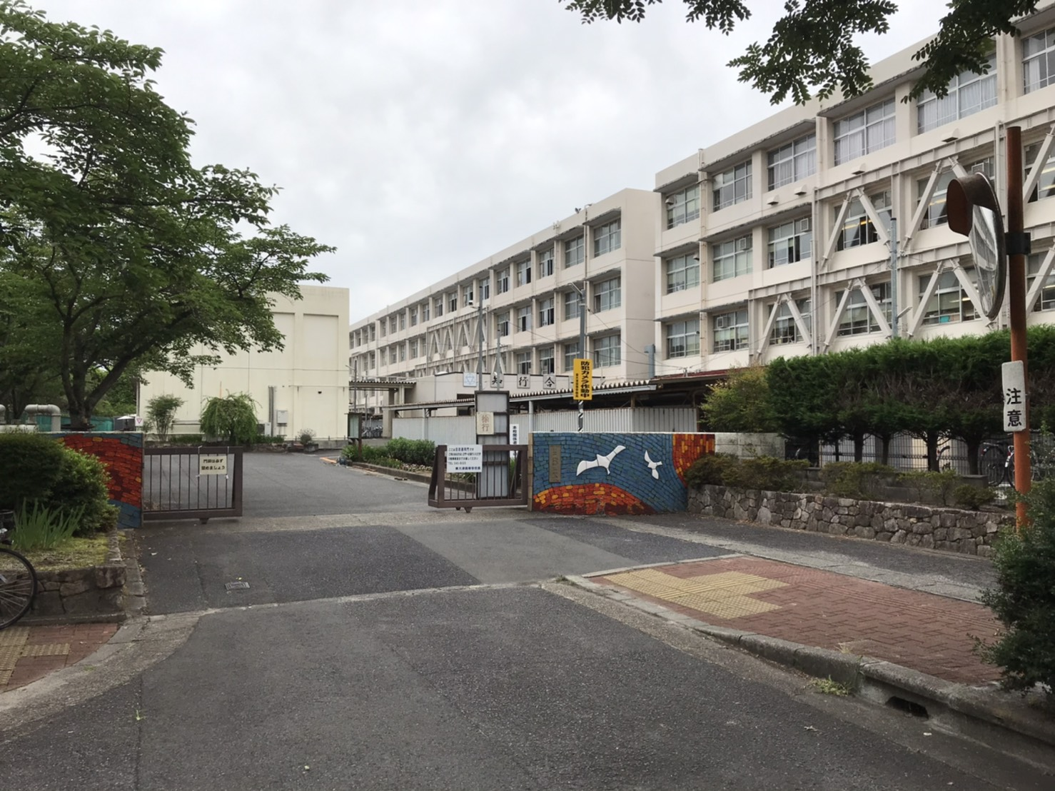 滋賀県立東大津高等学校の正門前の写真